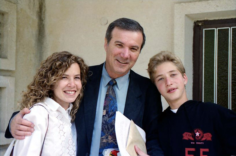 יורם גלובוס וילדיו אורלי וגיל